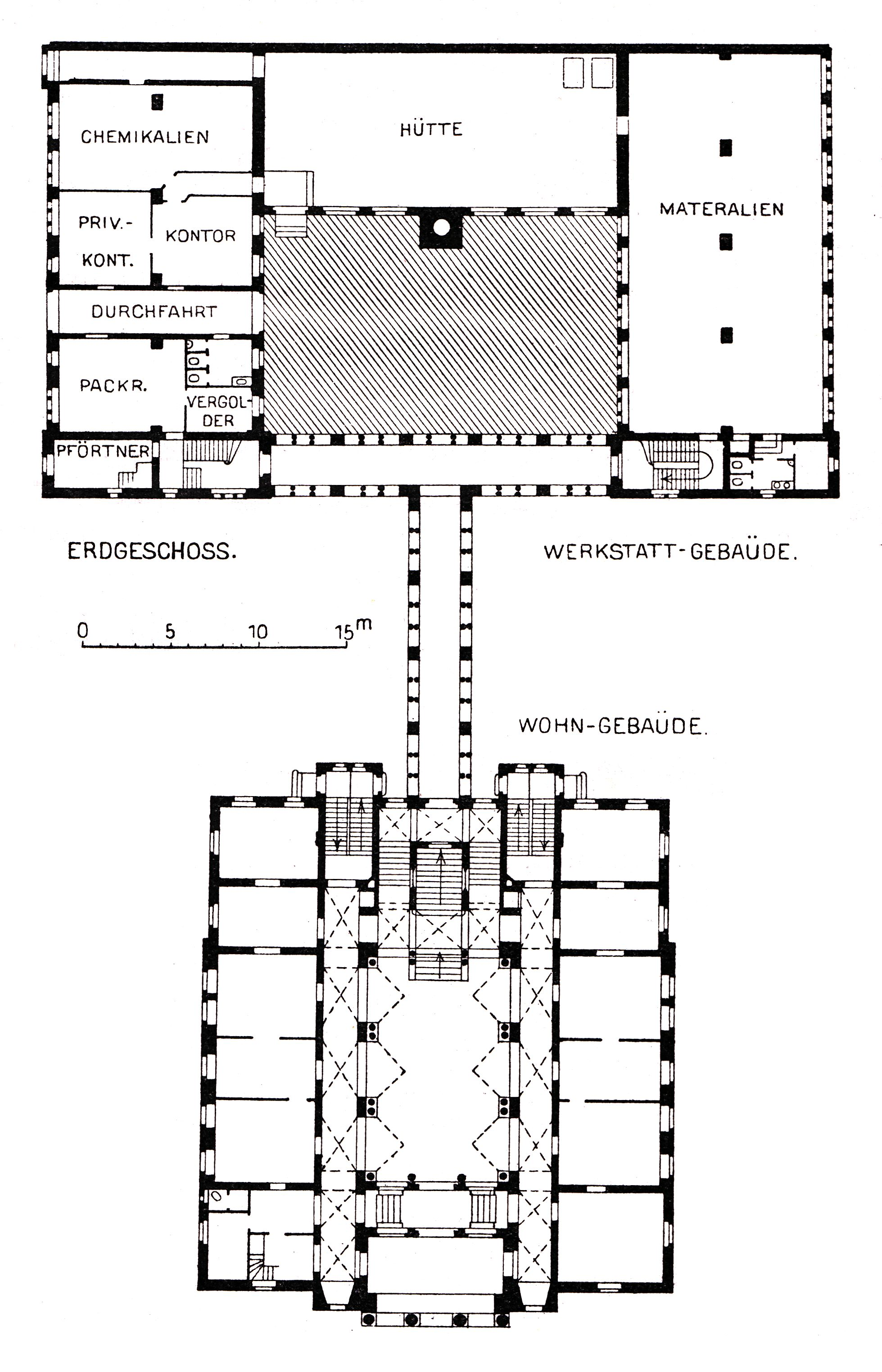 Berlin - Glasmosaikanstalt Puhl & Wagner, Grundriss Erdgeschoss des Fabrikgebäudes